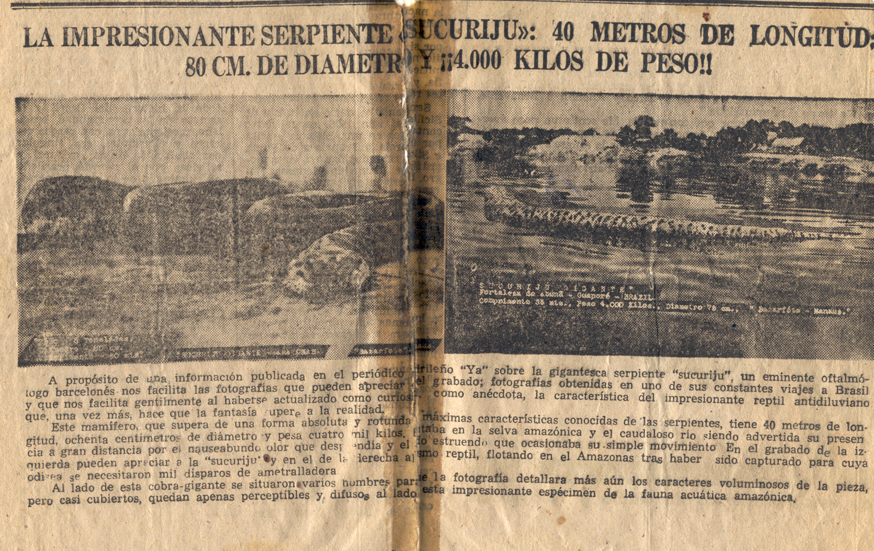 Fotografies publicades en el diari Ya